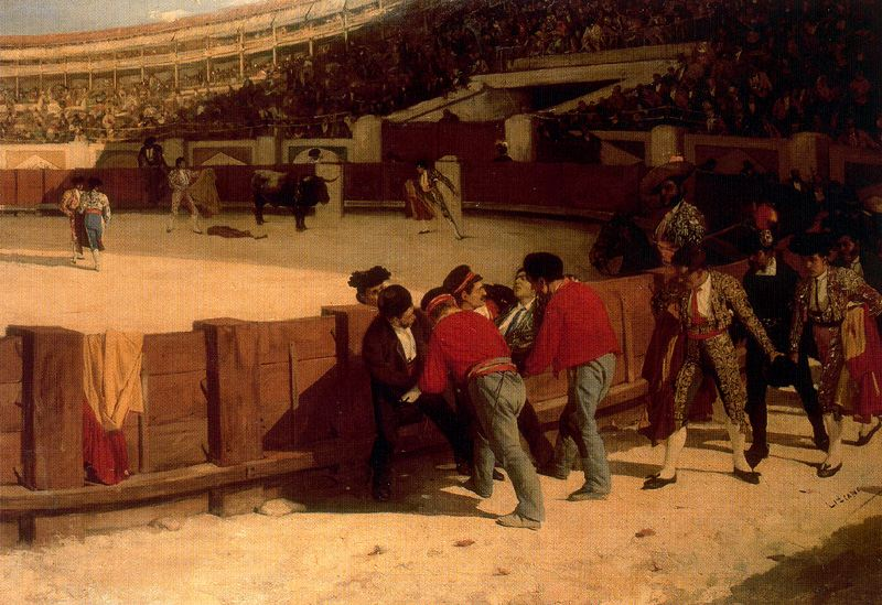 La cogida del torero, óleo sobre lienzo, 351 x 234 cm, firmado, 1877. Museo del Prado (en dep. en el Museo de Bellas Artes de Sevilla). Obra de Ángel Lizcano Monedero